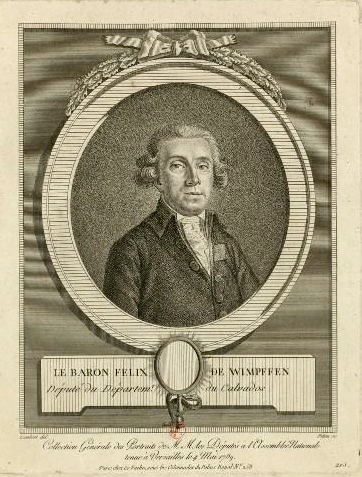 Georges Félix de Wimpffen (1744-1814), baron de Wimpfen, maréchal de camp, député de la noblesse du bailliage de Caen aux Etats Généraux en 1789